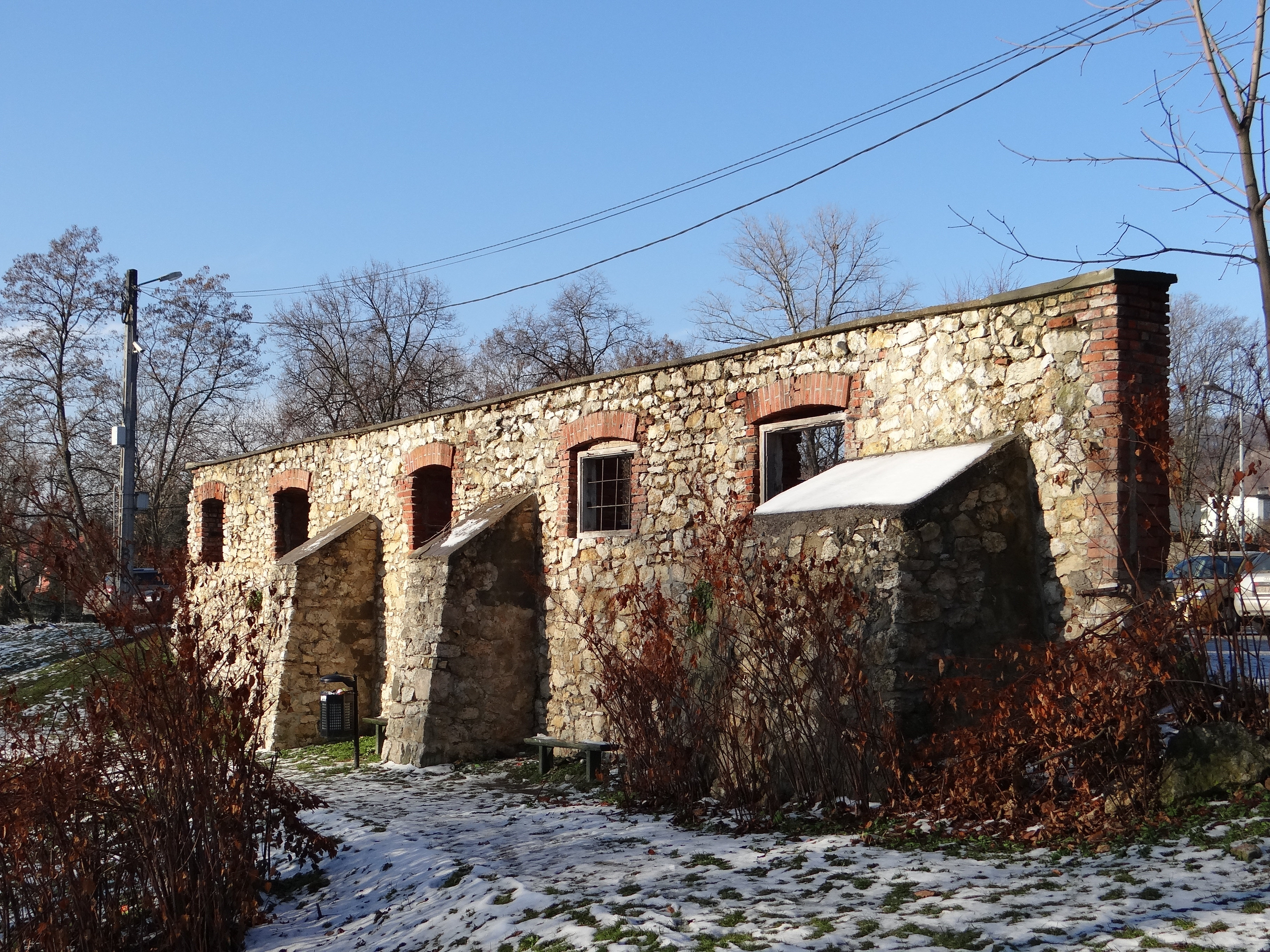 Bolechowice, park, XVIII, XIX